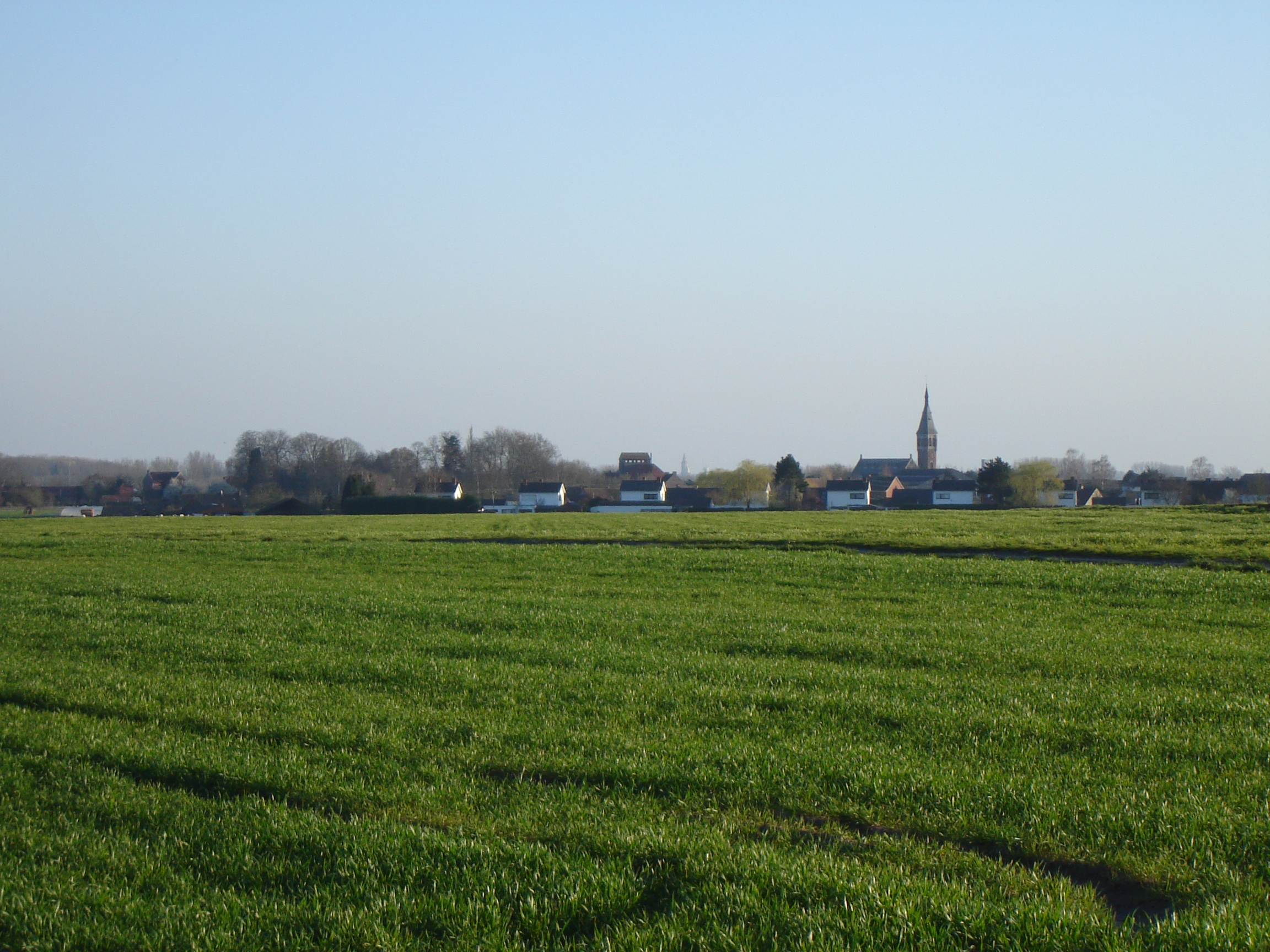 The village of Bléharies, as seen from Pierre de Brunehaut menhir site. Bléharies, Brunehaut, Hainaut, Belgium